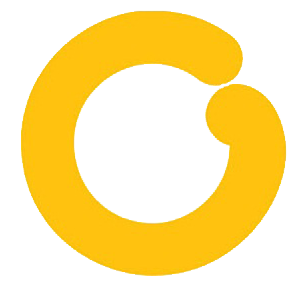 Logo del canal venezolano Globovisión.